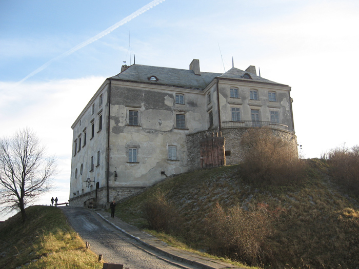 Олеский замок во Львовской области